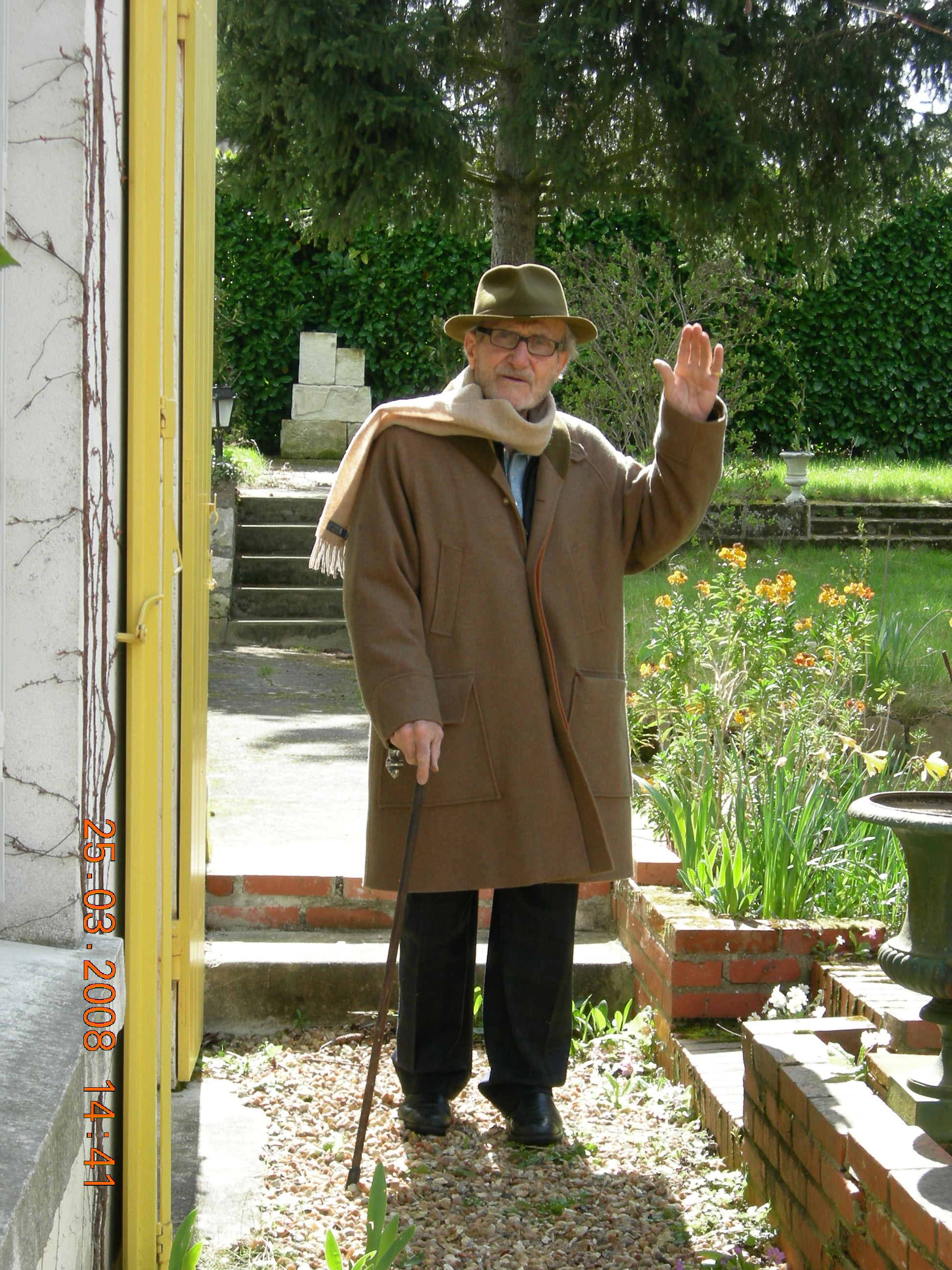 Jean JANSEM à son domicile à St Aignan-sur-Cher, 2008